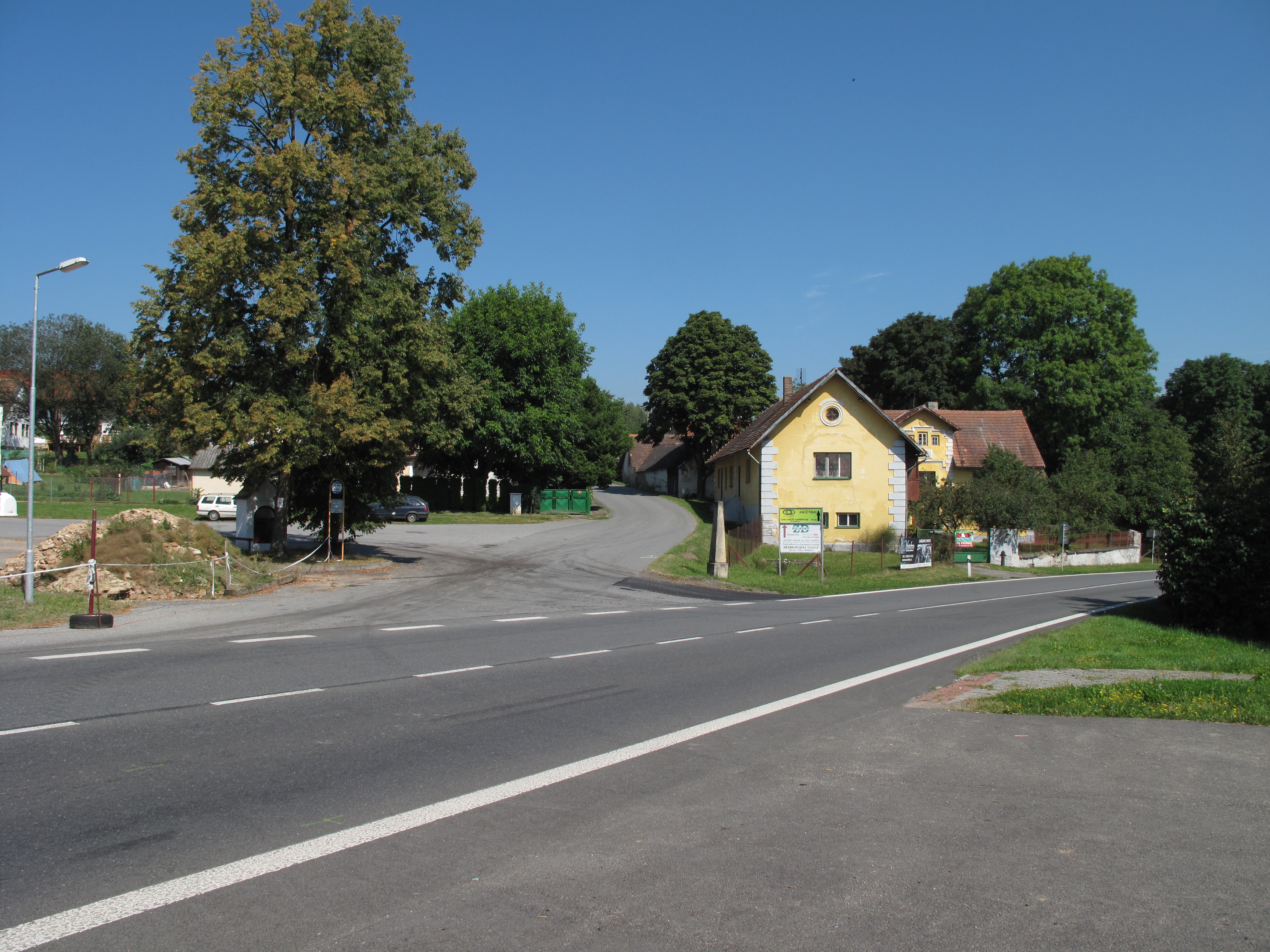 Lejčkov. Okres Tábor, Česká republika.